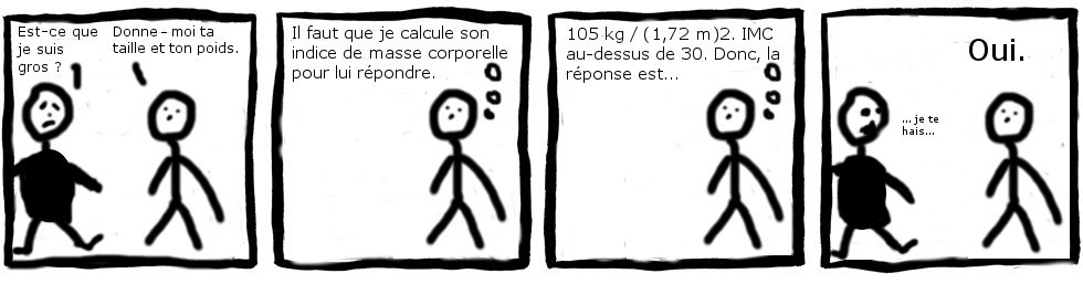 Strip de 4 cases décrivant la manière dont raisonnent les autistes Asperger lorsqu'on leur pose une question impliquant de l'émotionnel.